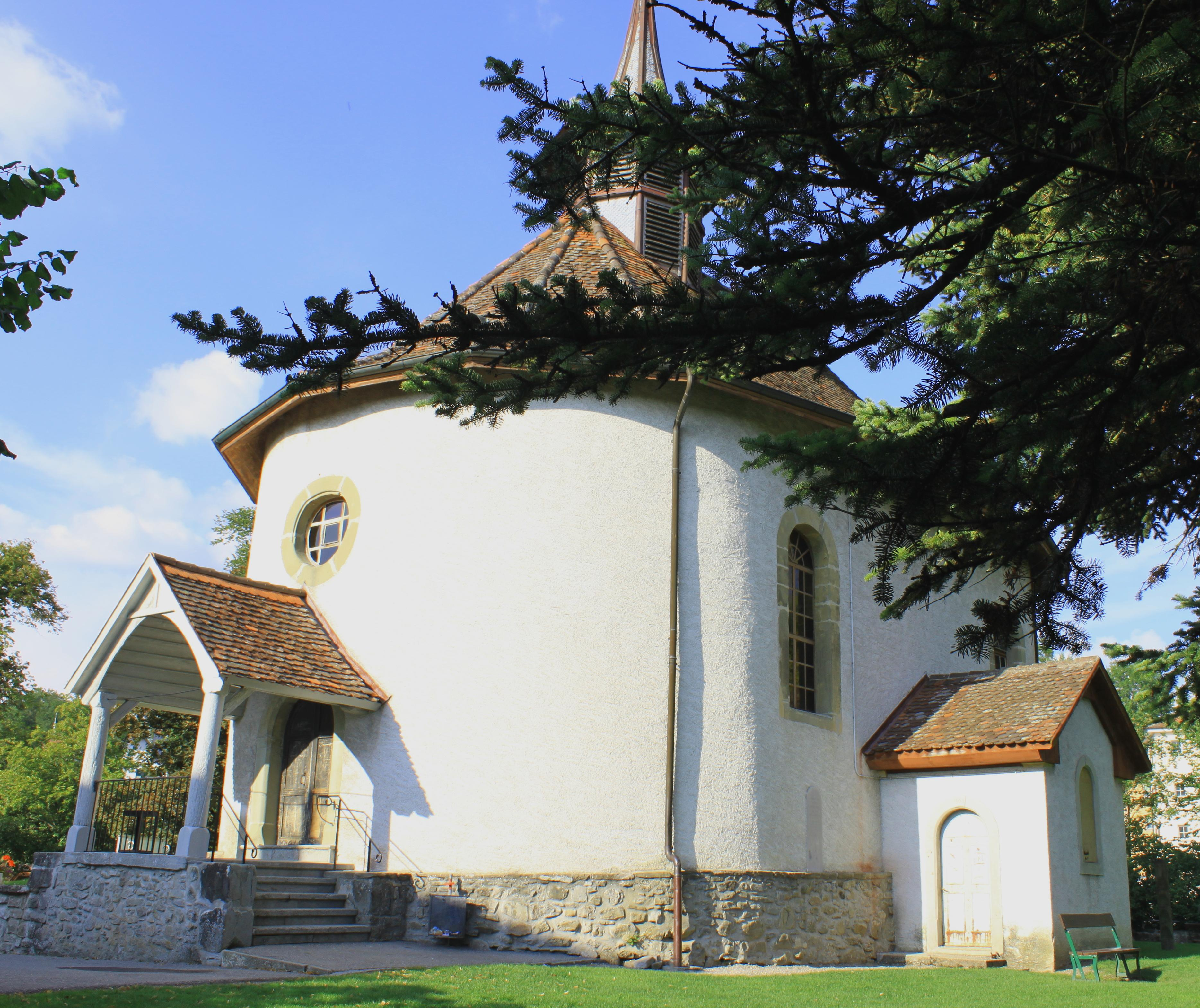 Suisse, canton de Vaud, Oron-la-Ville, temple.